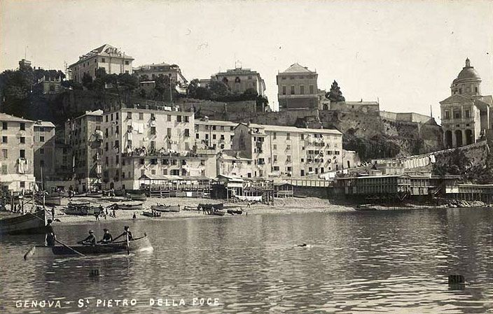 Immagini di fine Ottocento o inizio Novecento del quartiere della Foce, Genova, Liguria, Italia